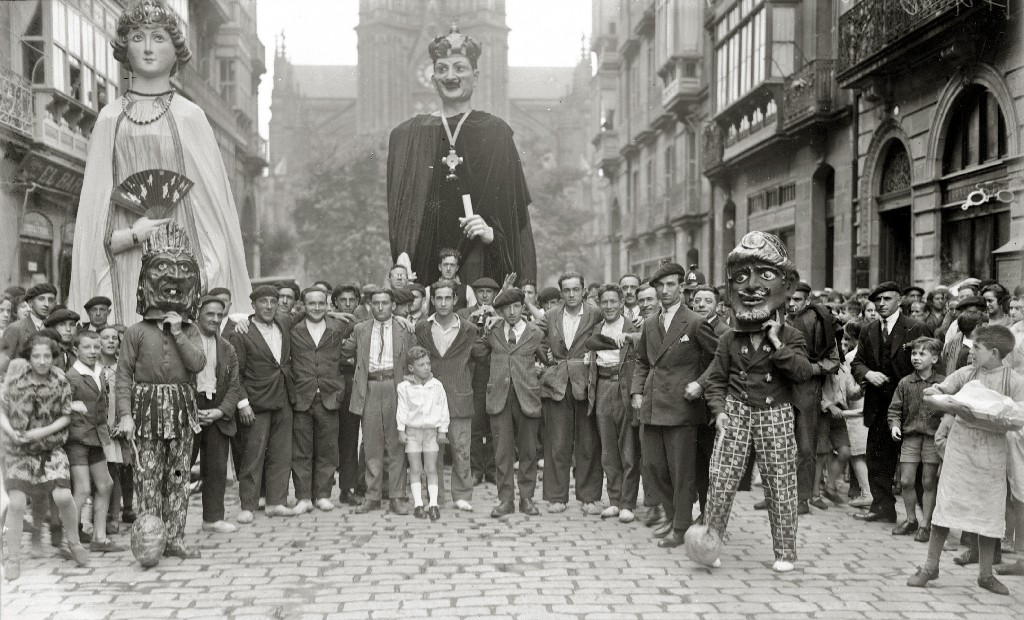 Título original: Gigantes y Cabezudos por la calle Loiola (2/3) Localización: San Sebastián (Guipúzcoa)